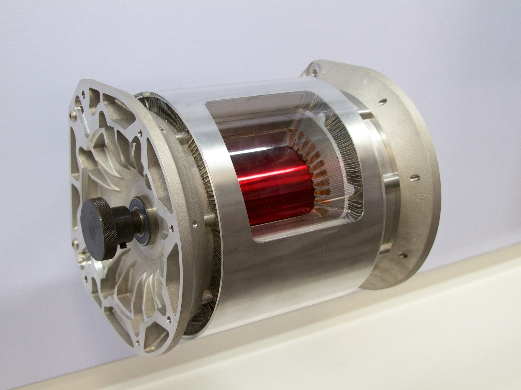 Tesla Visit 10